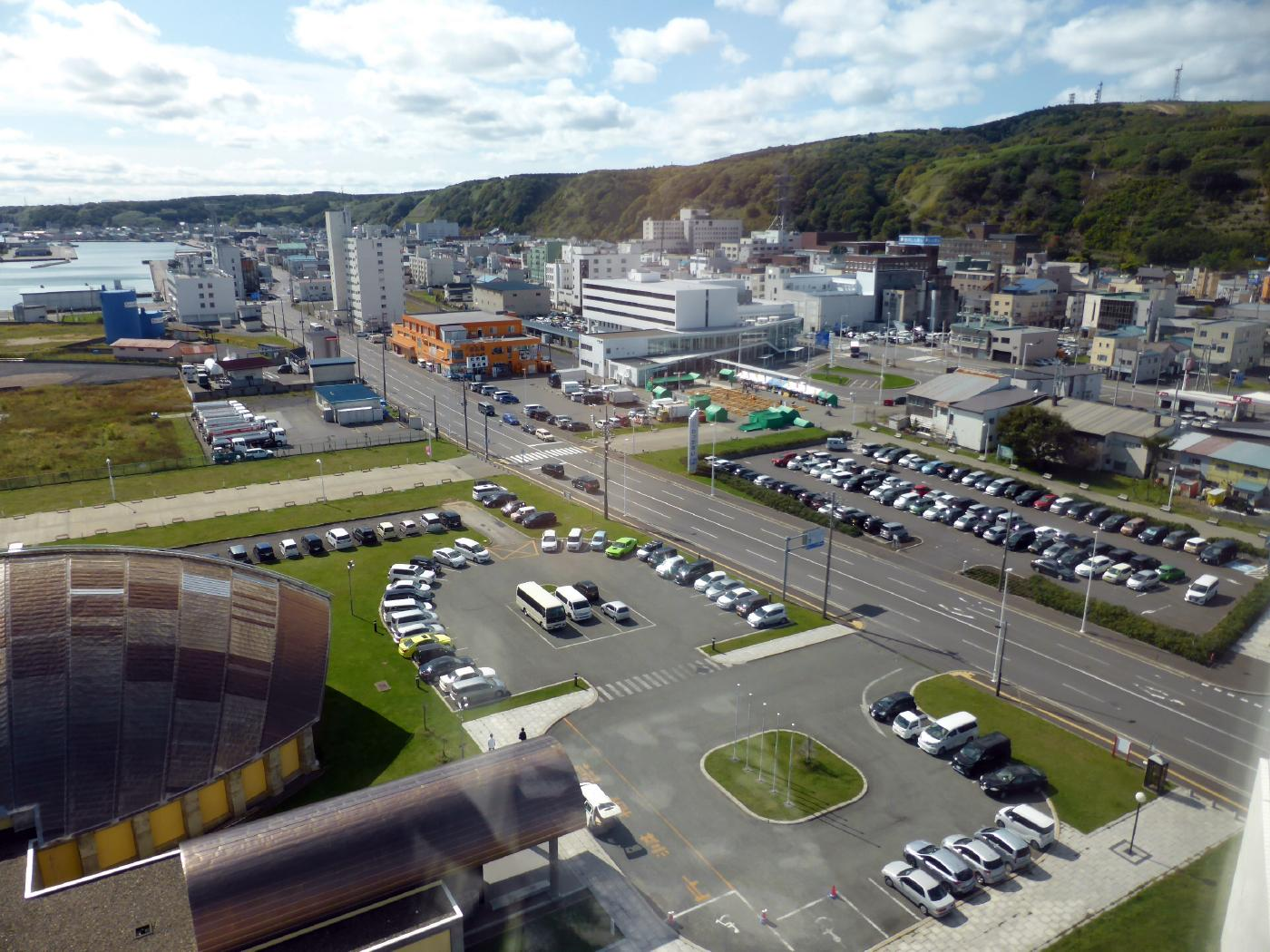 客室最上階から稚内駅を望む